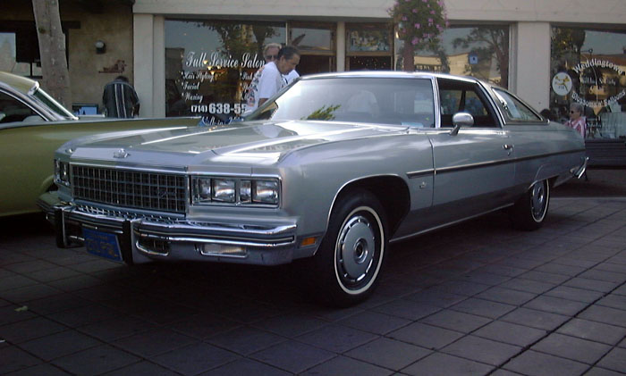 1976 Chevrolet Caprice Classic Landau.